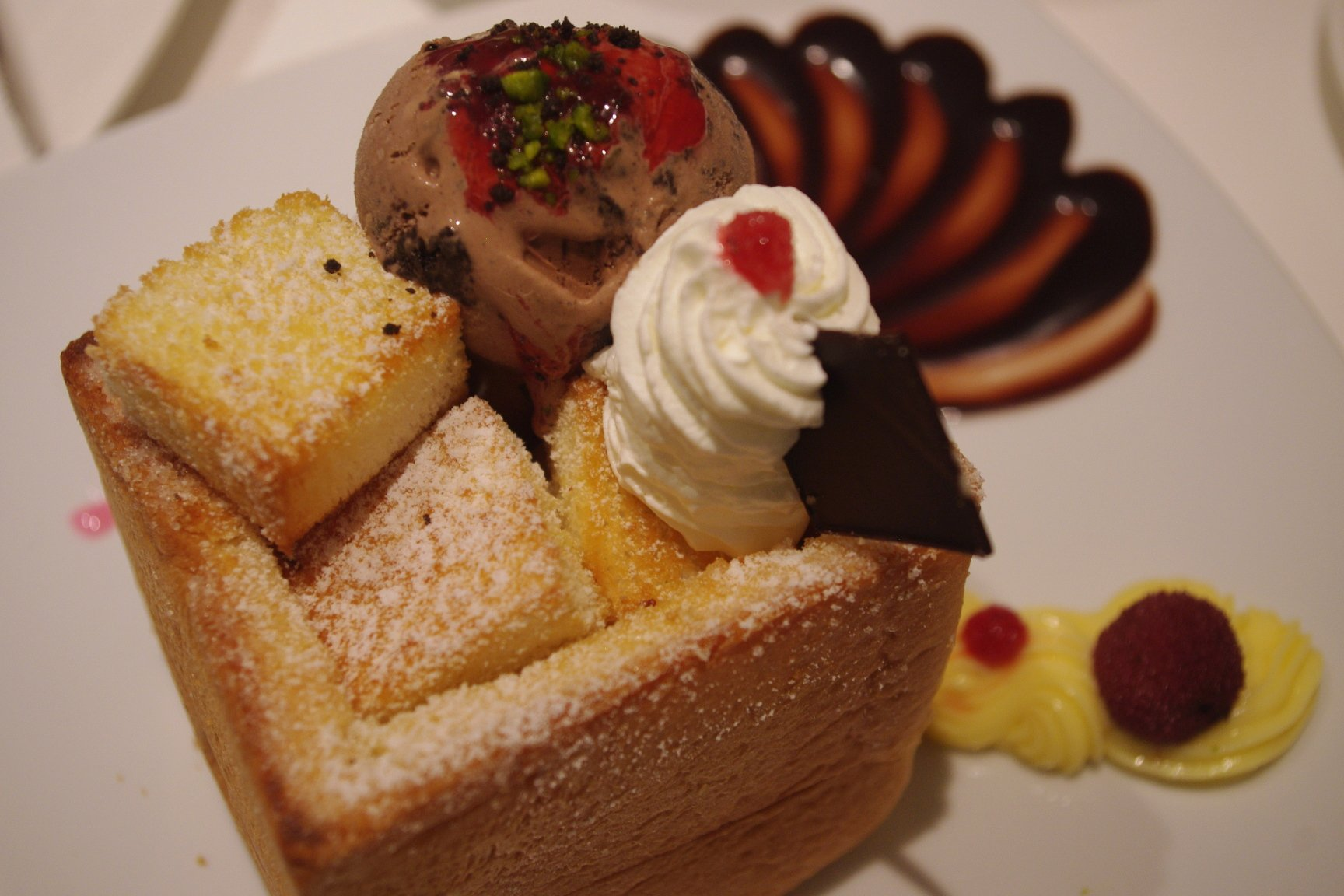 巧克力嘉年華蜜糖土司